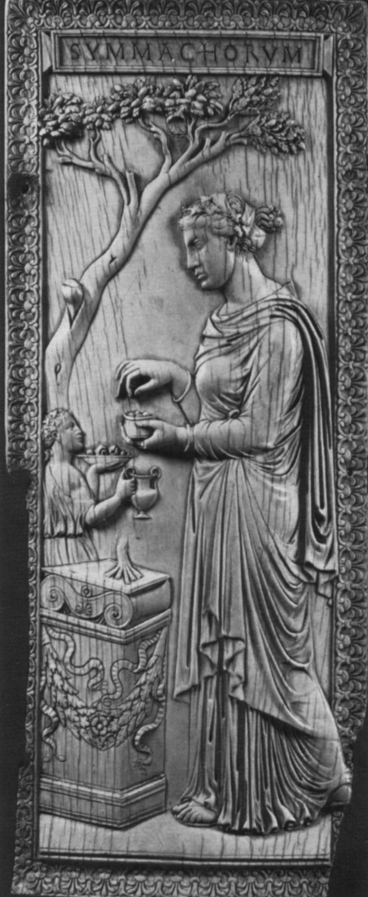 Dittico dei simmachi 02 V&Am